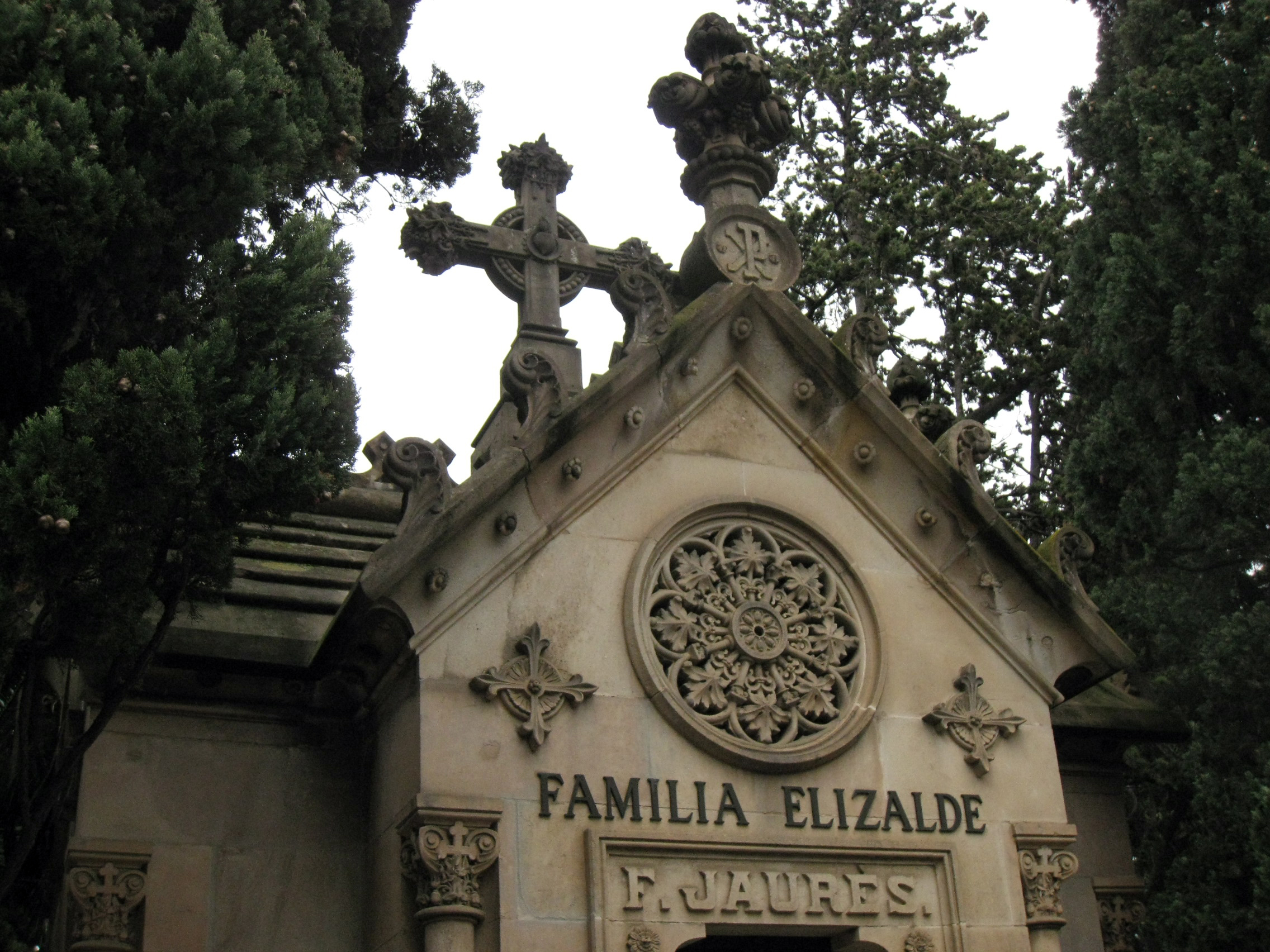 Cementiri de Montjuïc (Barcelona)